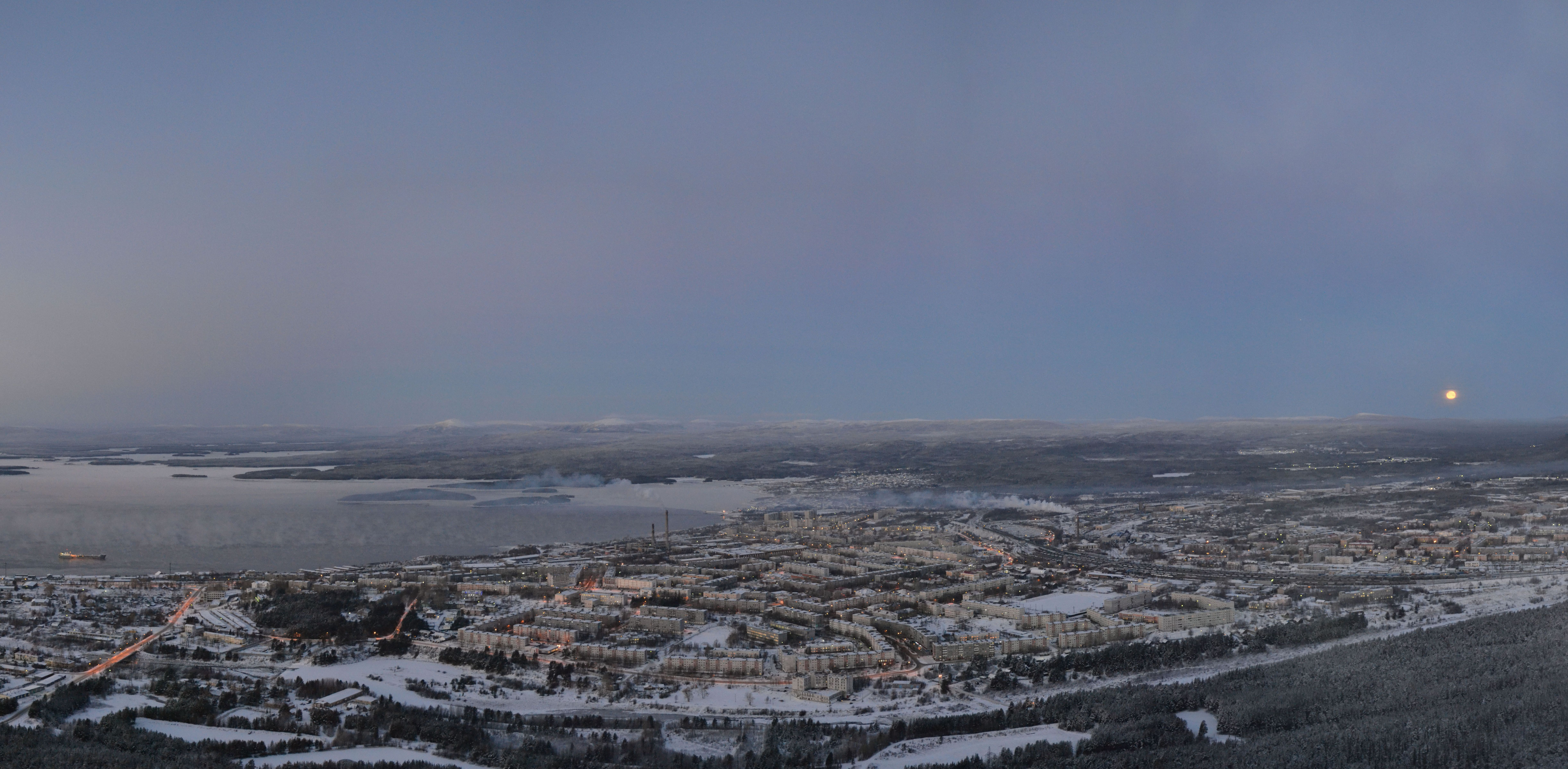 Кандалакша. 28.11.2012.